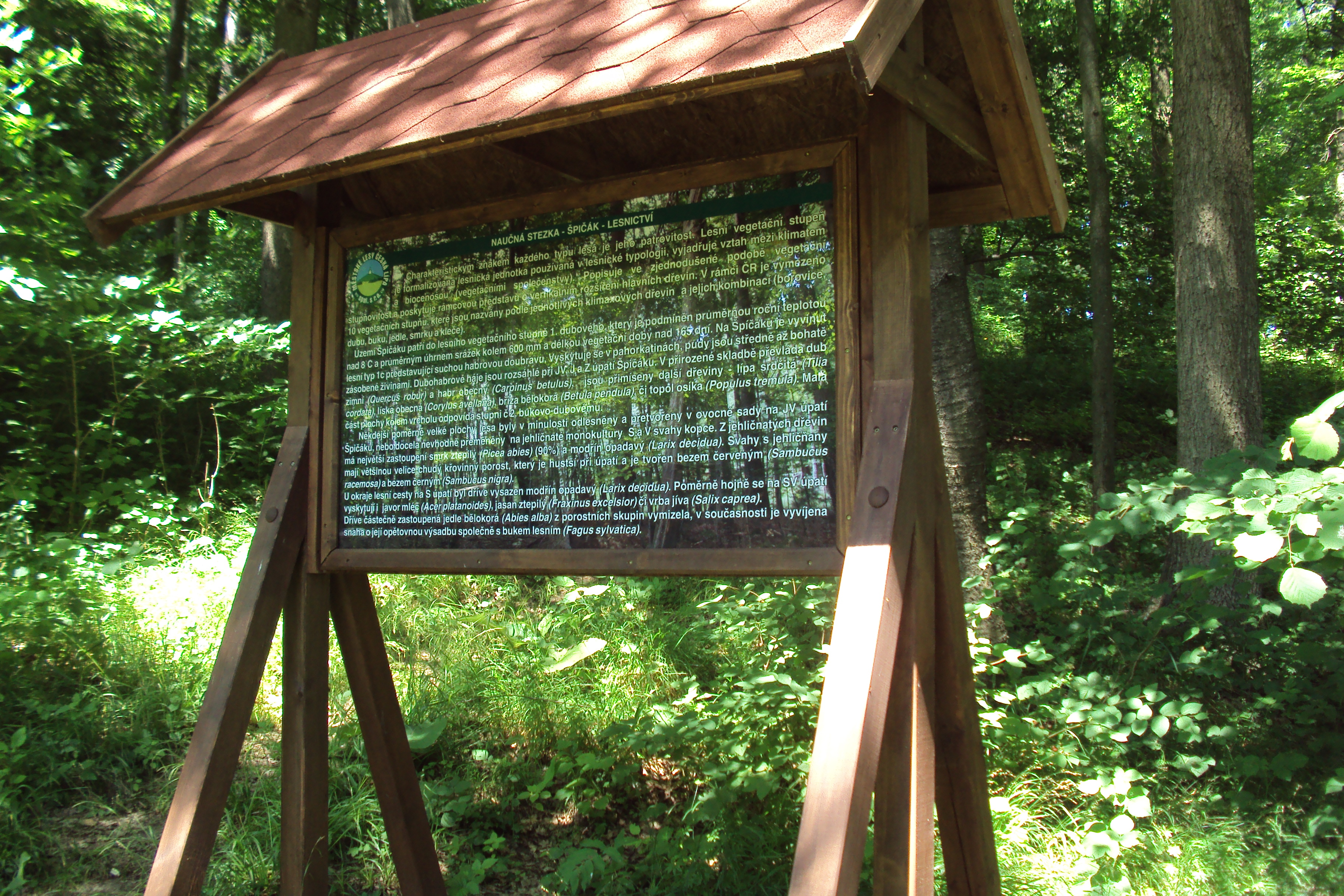 Naučná stezka Špičák na katastru České Lípy, na modré turistické trase